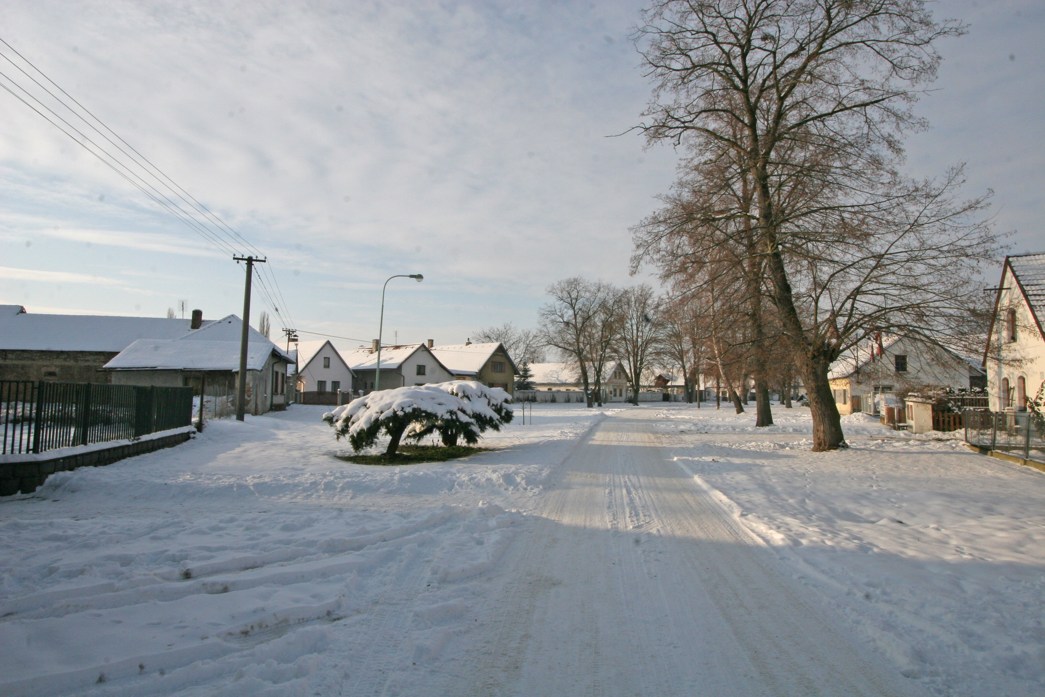 Náves v Platěnicích